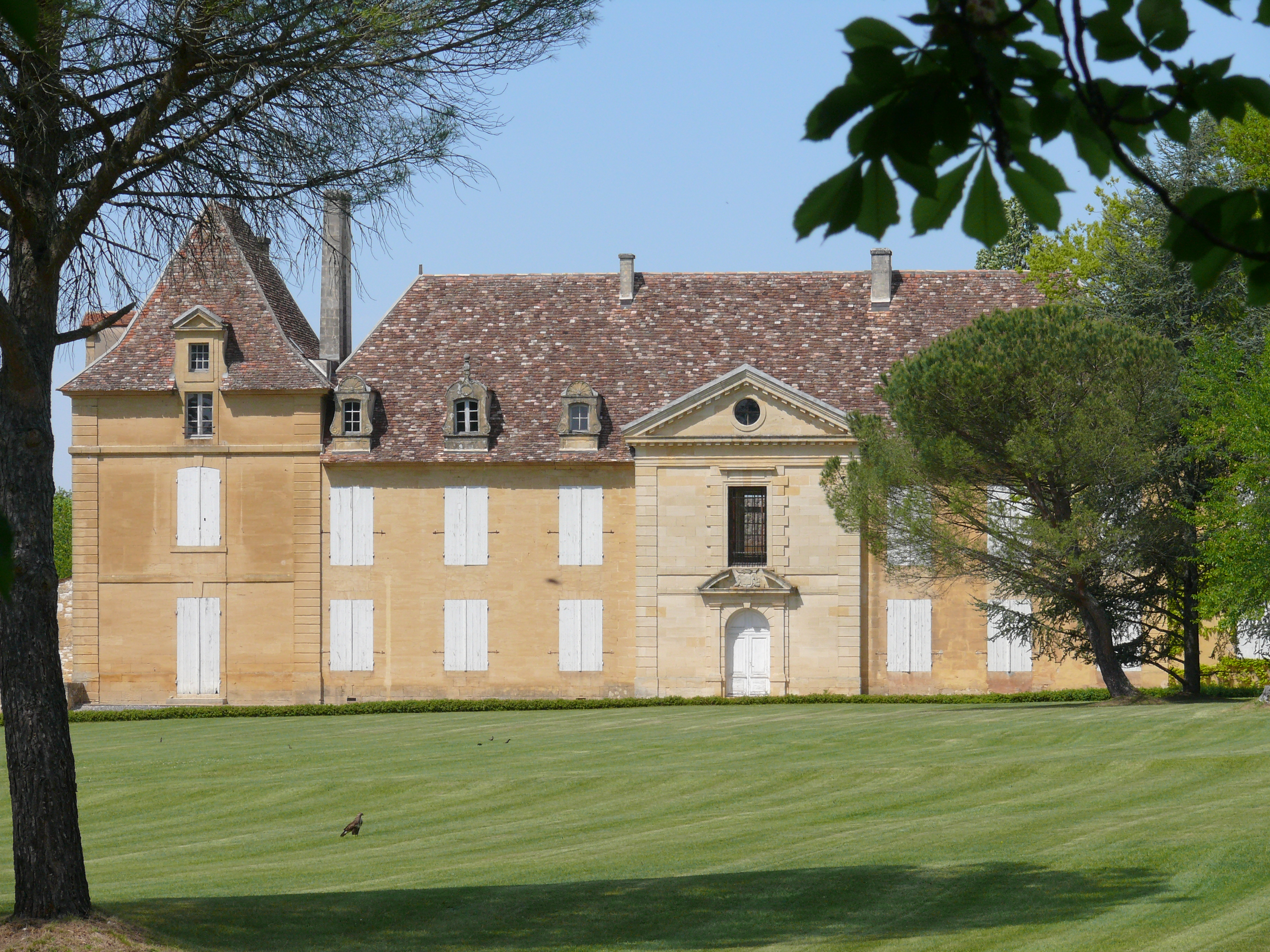 Château de Sainte-Croix (Dordogne)